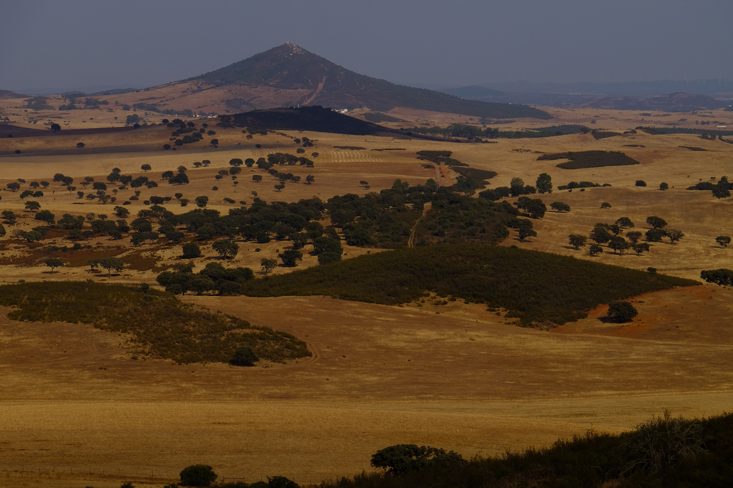 Castro Verde , Mertola und Umgebung lohnt sich sehr.